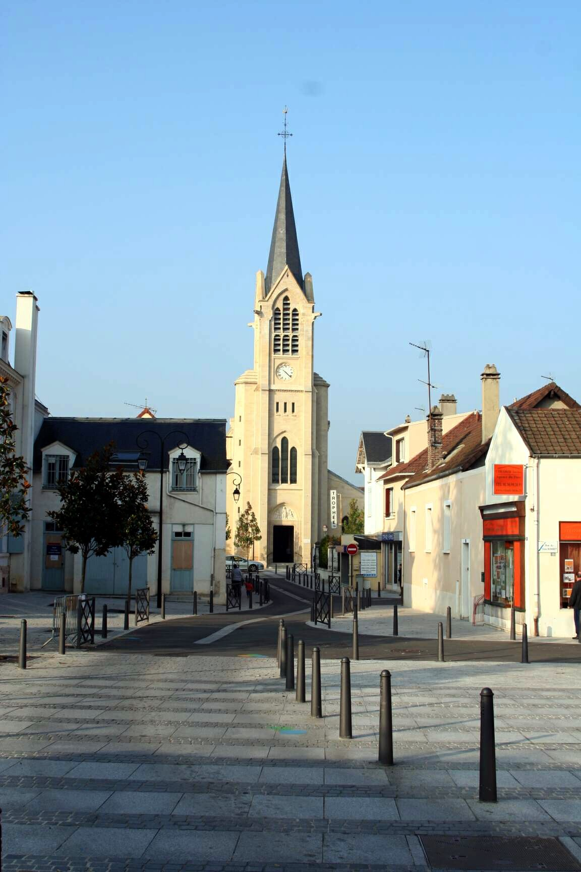 Église des Mureaux - Yvelines (France)